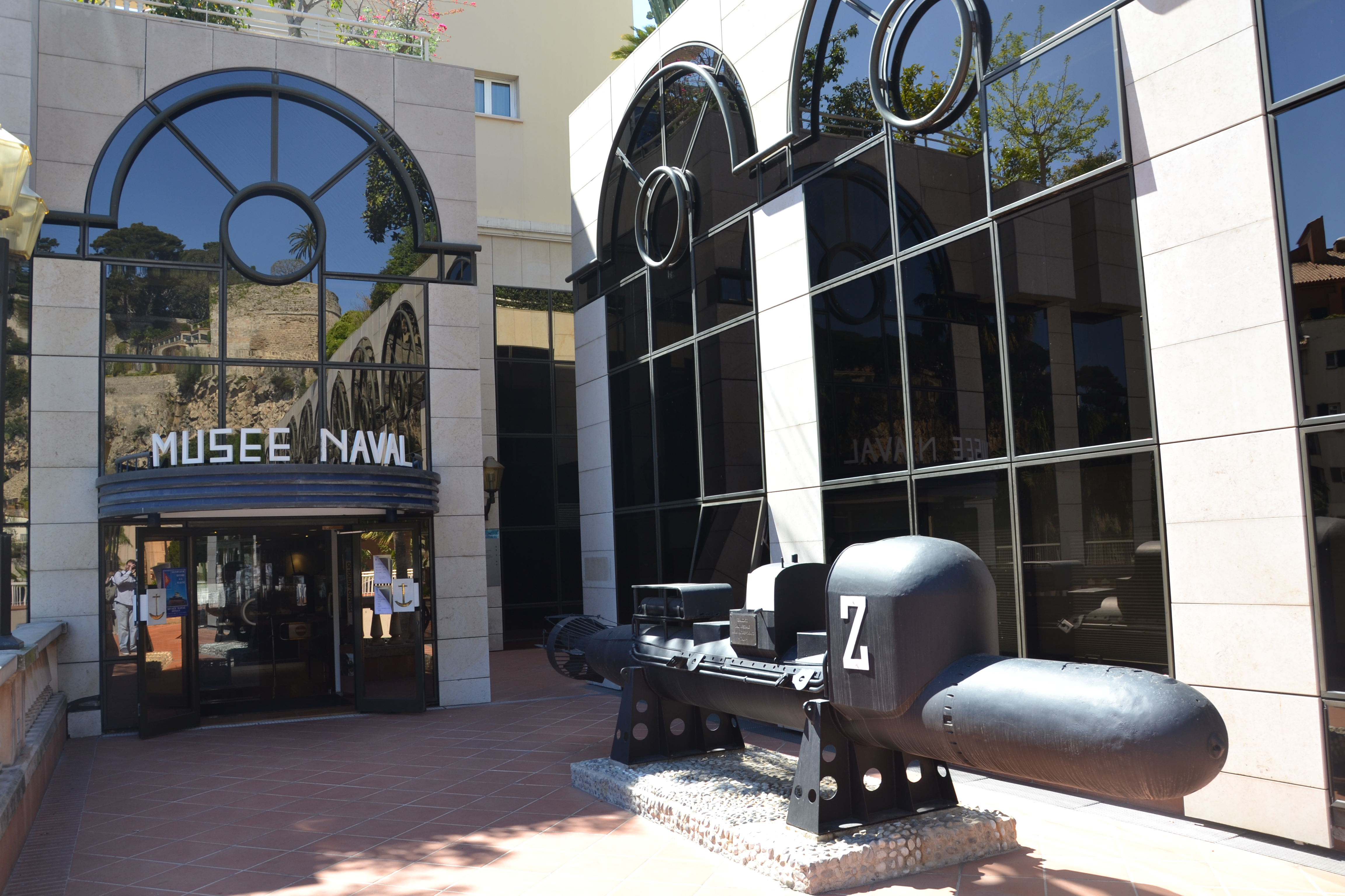 Musée Naval